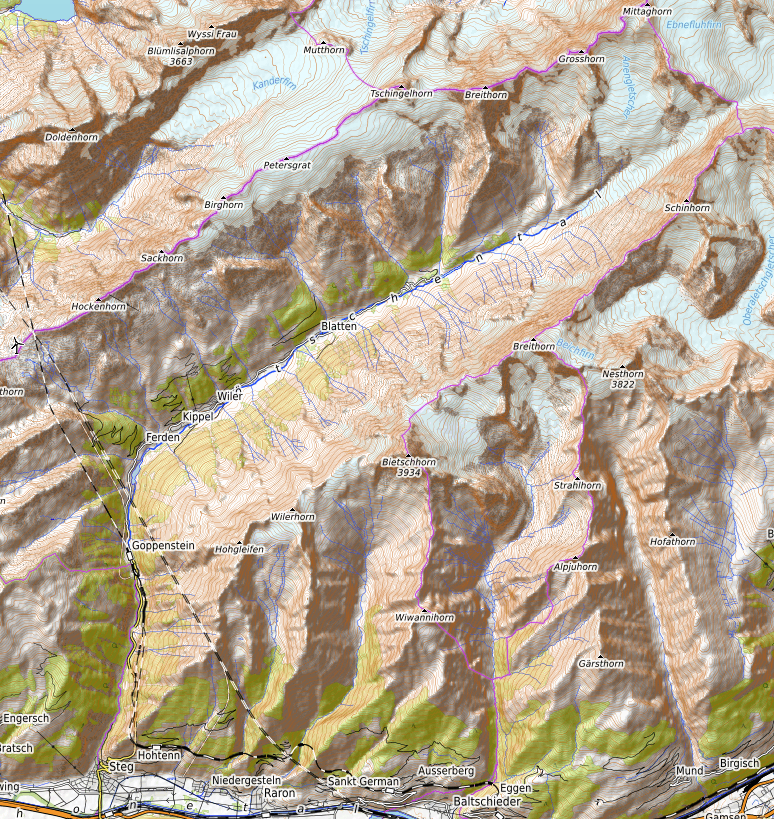 carte réalisée sur umap This map may be incomplete, and may contain errors. Don't rely solely on it for navigation.